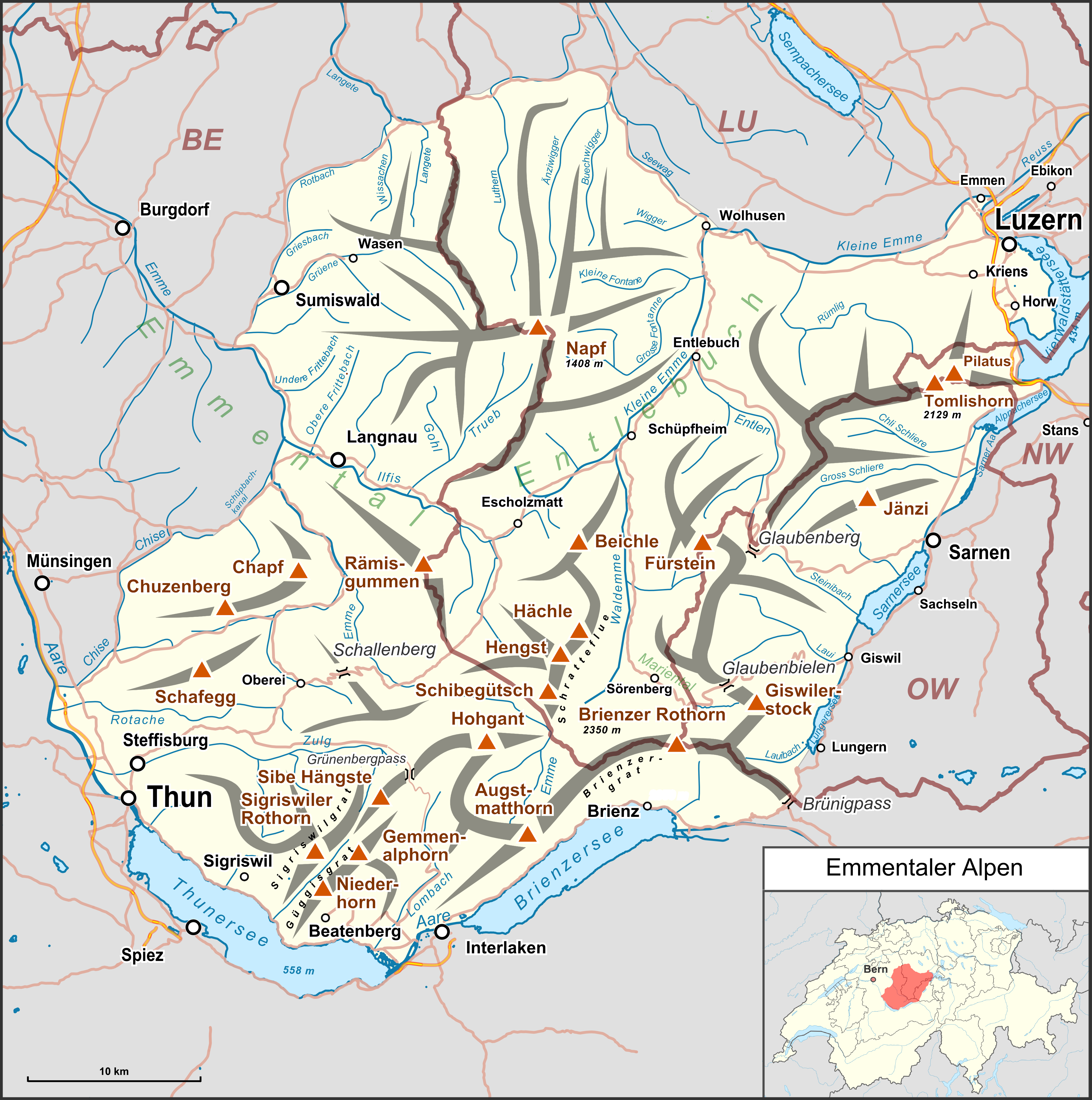 Lagekarte der Emmentaler Alpen